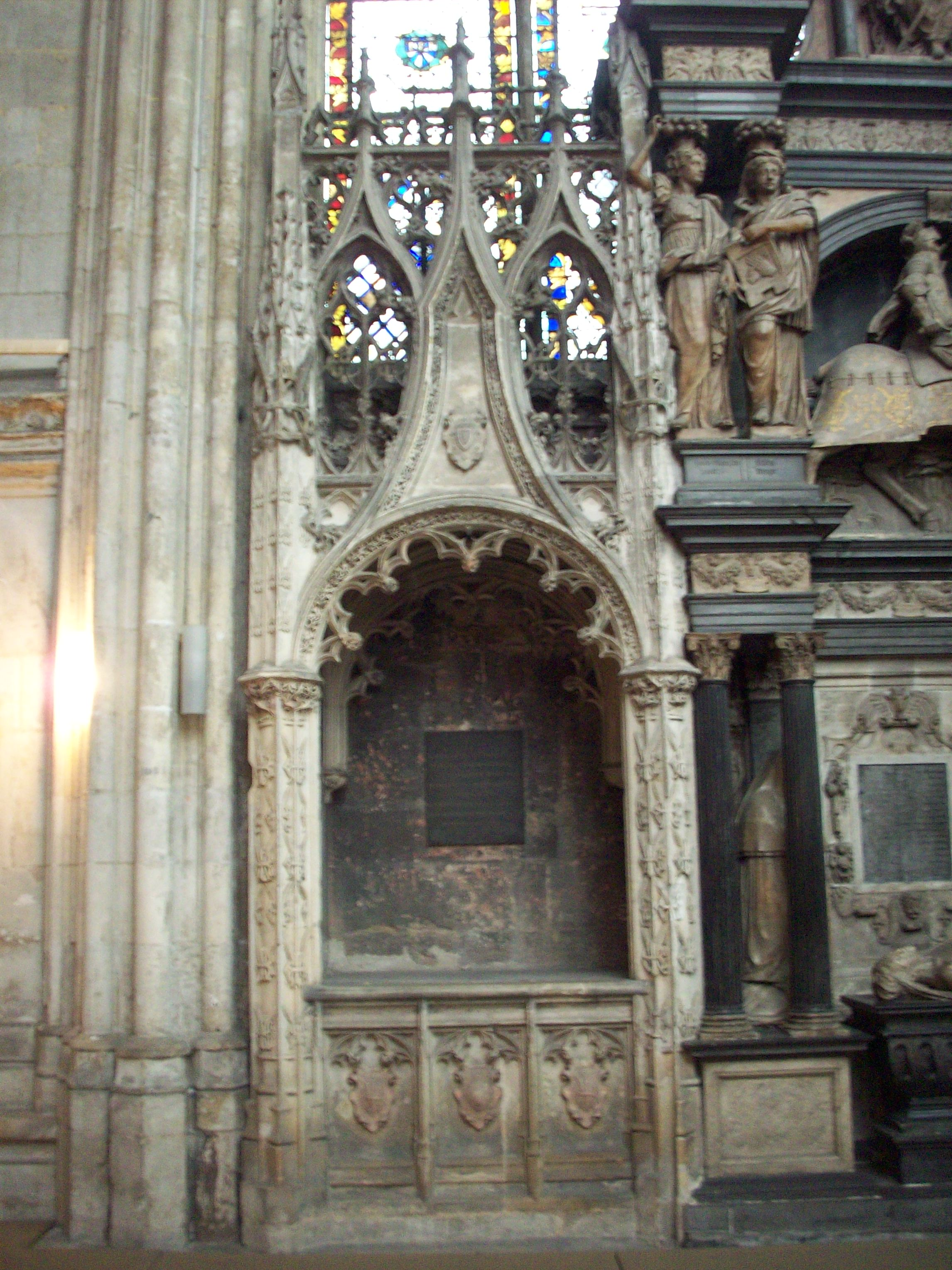 Enfeu de Pierre de Brézé et de sa femme Jeanne du Bec-Crespin, de style flamboyant de la fin du XVe siècle, dans la chapelle de la Vierge.